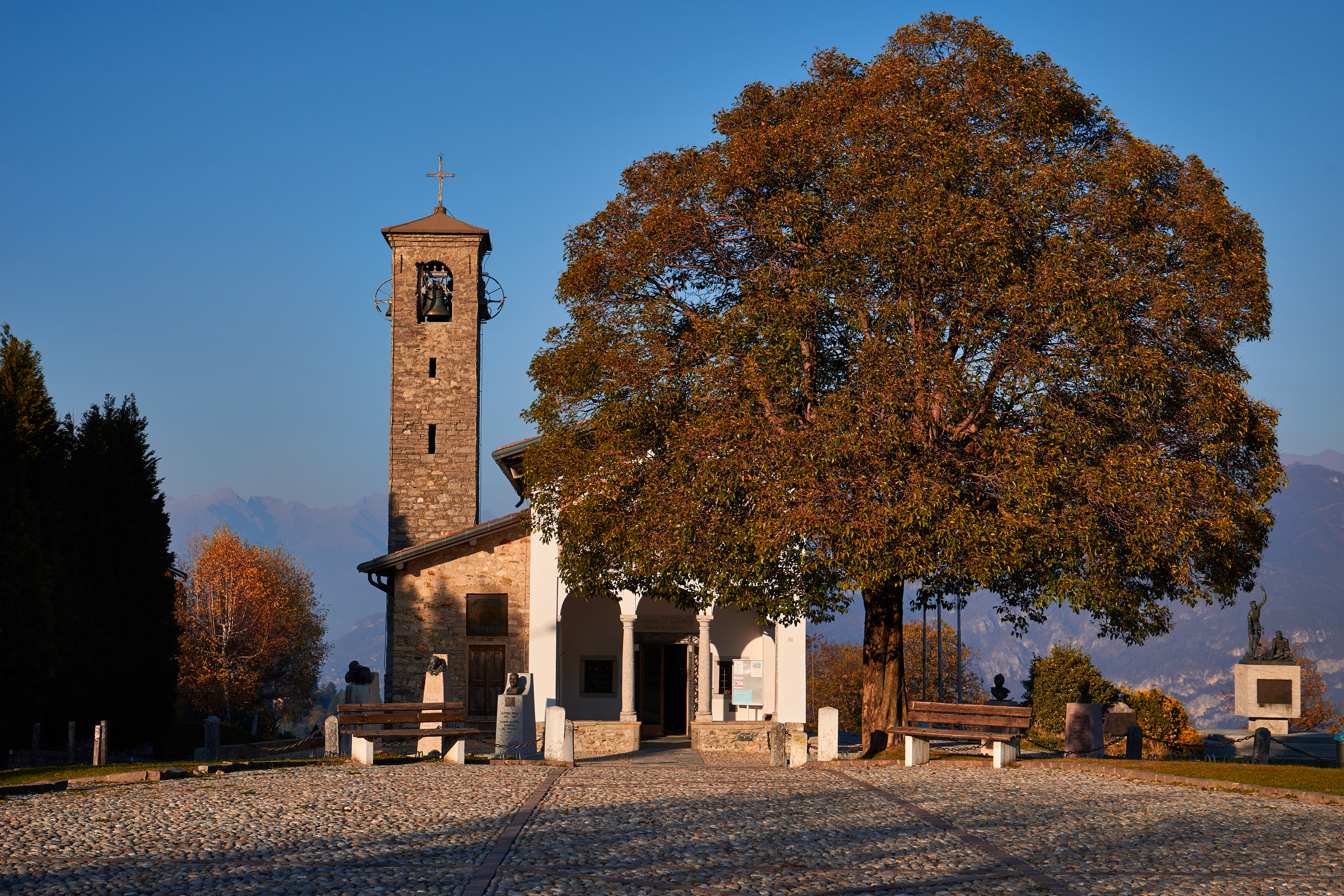 Magreglio